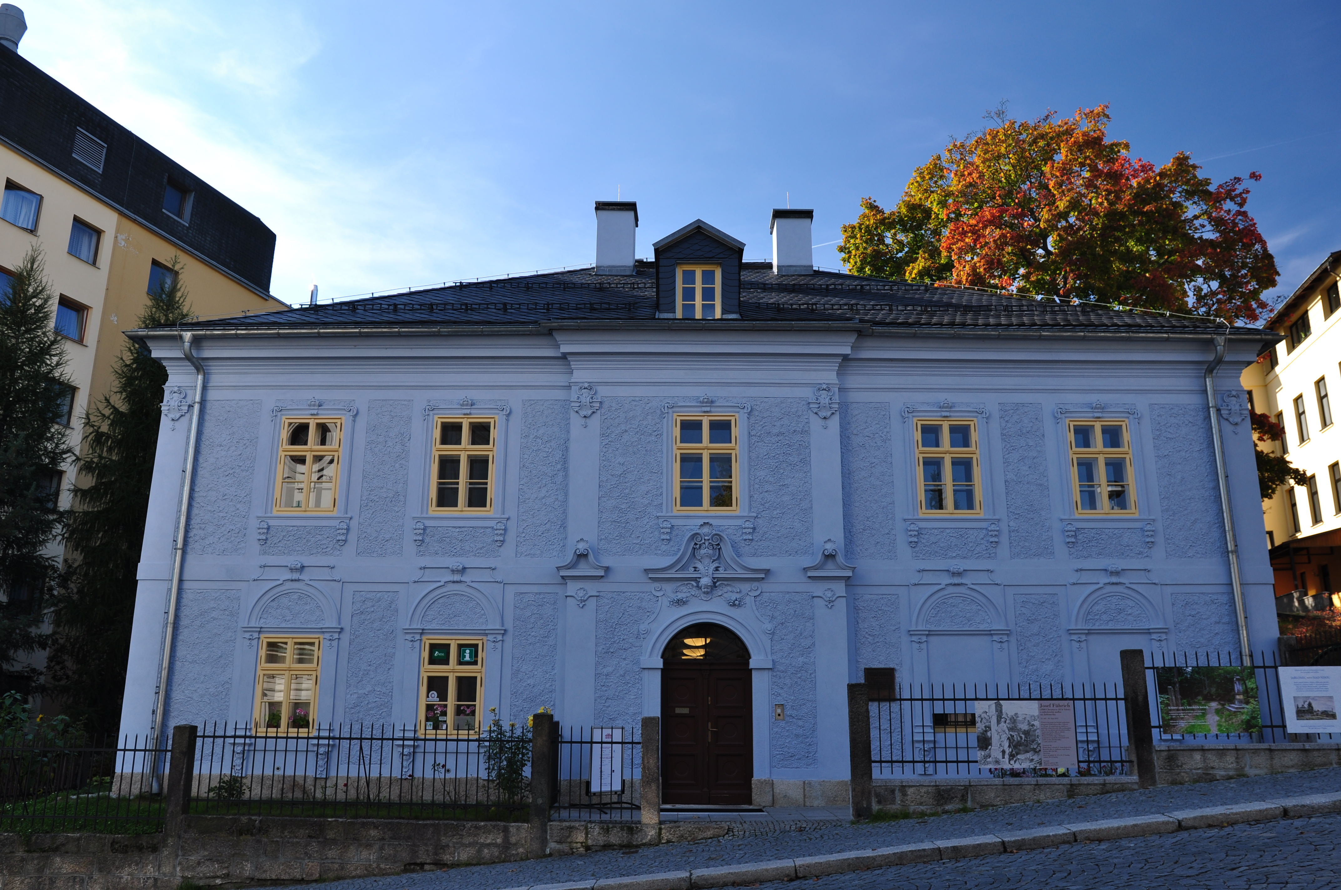 Stará fara, Kostelní 1/6, Jablonec nad Nisou.